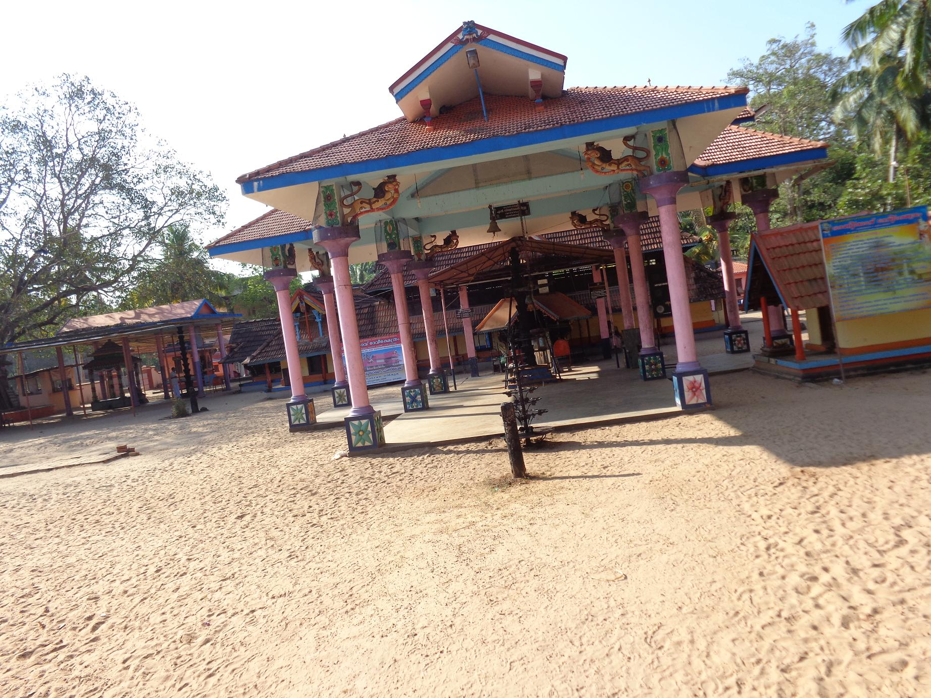 kattanam bharanikavu bhadrakali temple